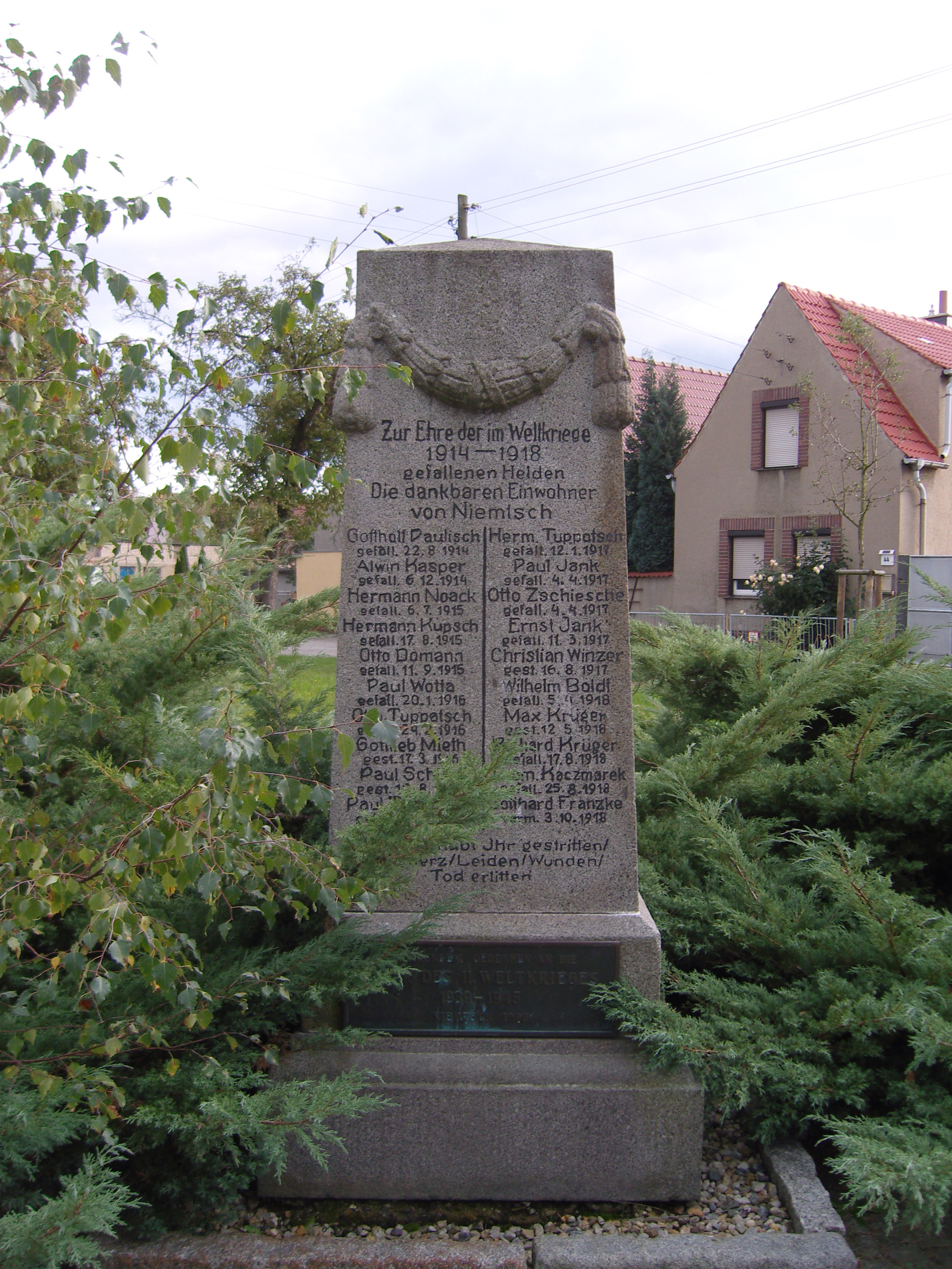 Kriegerdenkmal für die Gefallenen des Ersten Weltkriegs im Senftenberger Ortsteil Niemtsch - mit Tafel für die Gefallenen des Zweiten Weltkriegs